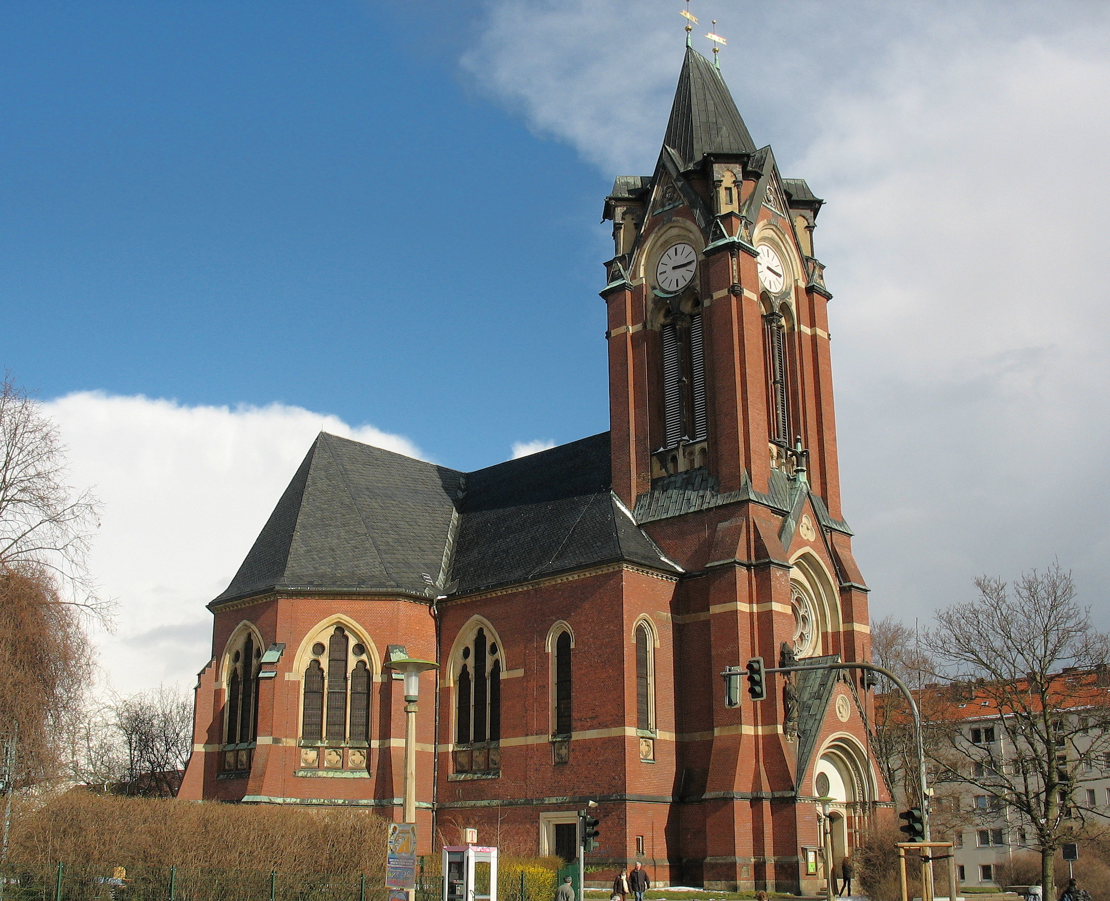 Pauluskirche in Plauen von der Kaiserstraße aus gesehen